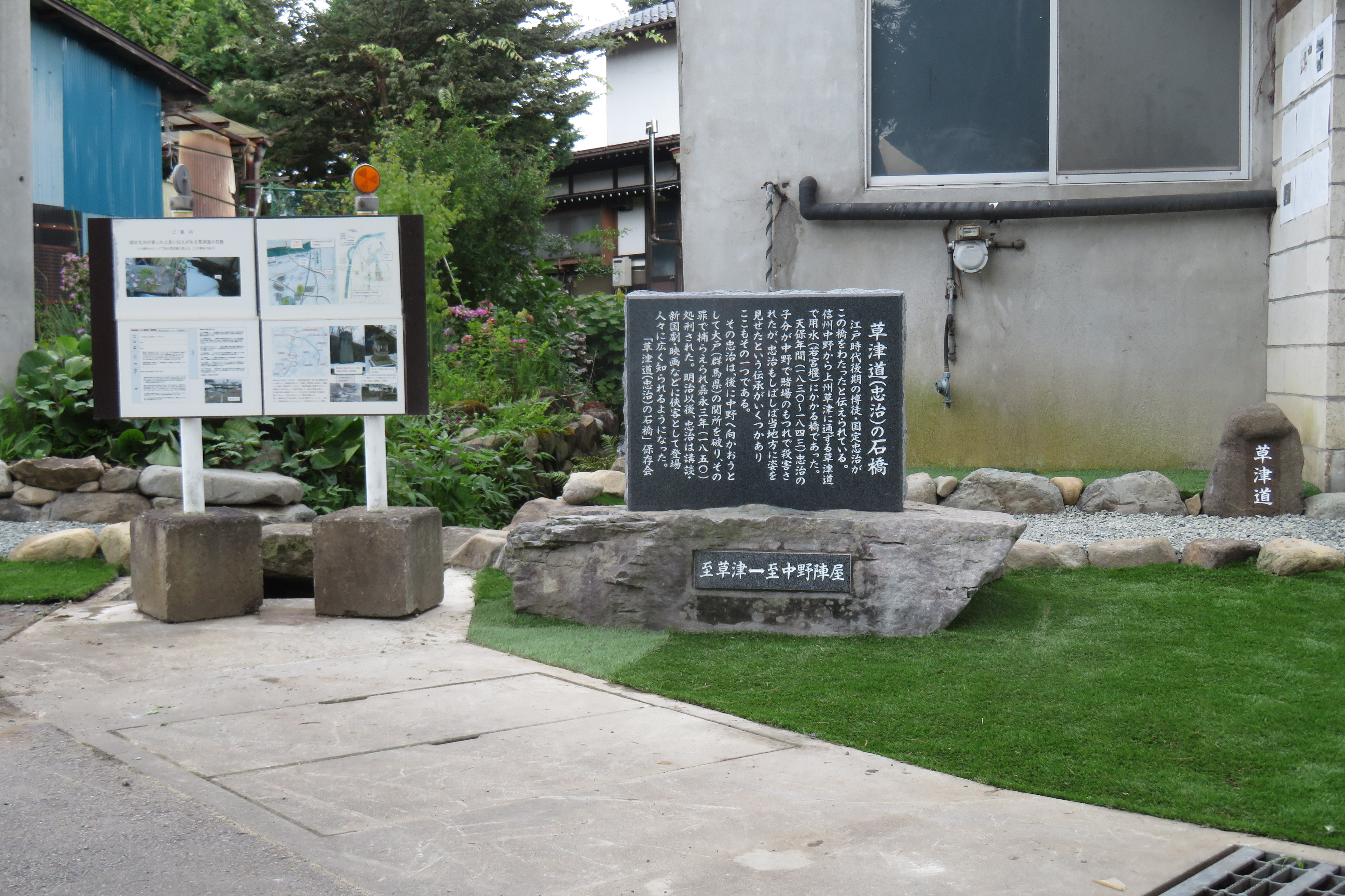 長野県中野市にある草津道（忠治）の石橋